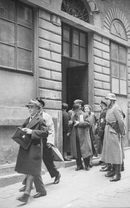 Wien, SS-Razzia bei jüdischer Gemeinde Österreich, Wien.- Razzia der SS in der israelitischen Kultusgemeinde (Gemeindehaus), Seitenstettengasse 4